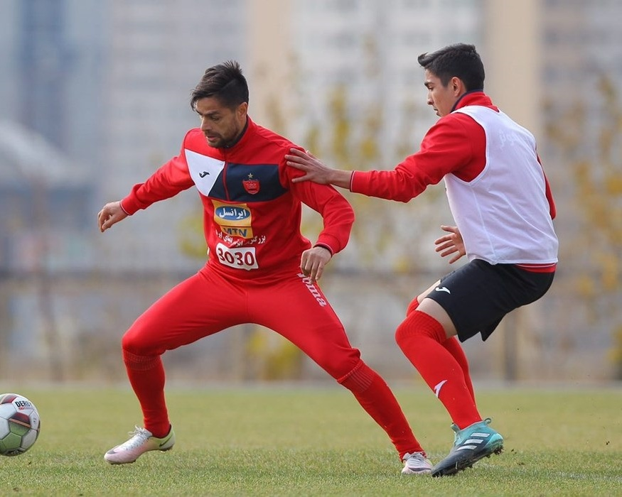 کمال کامیابی‌نیا در تمرینات تیم فوتبال پرسپولیس